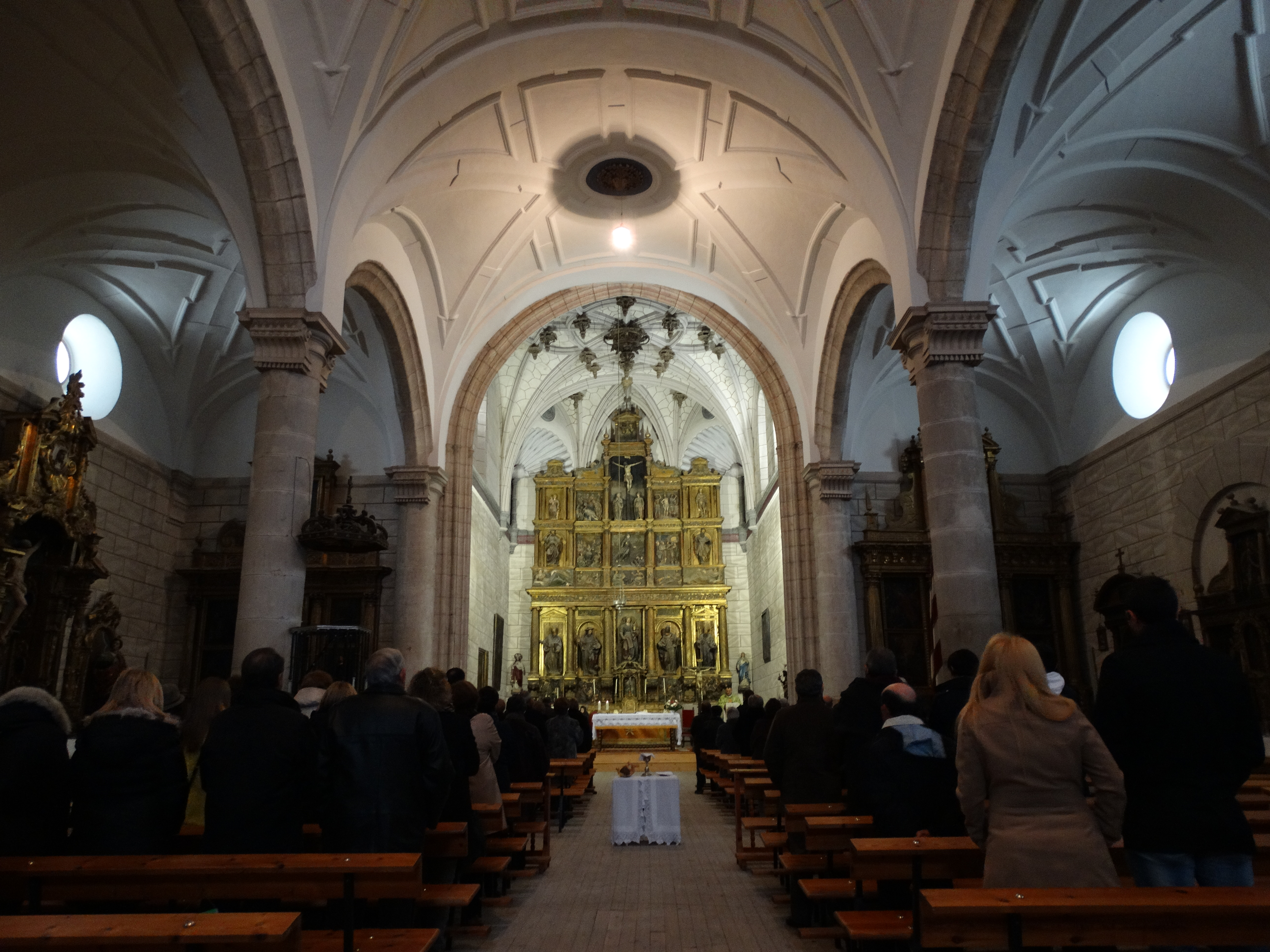 Interior de la iglesia de la Magdalena en Matapozuelos (Valladolid), España. Las naves laterales fueron construidas por Juan de la Vega.